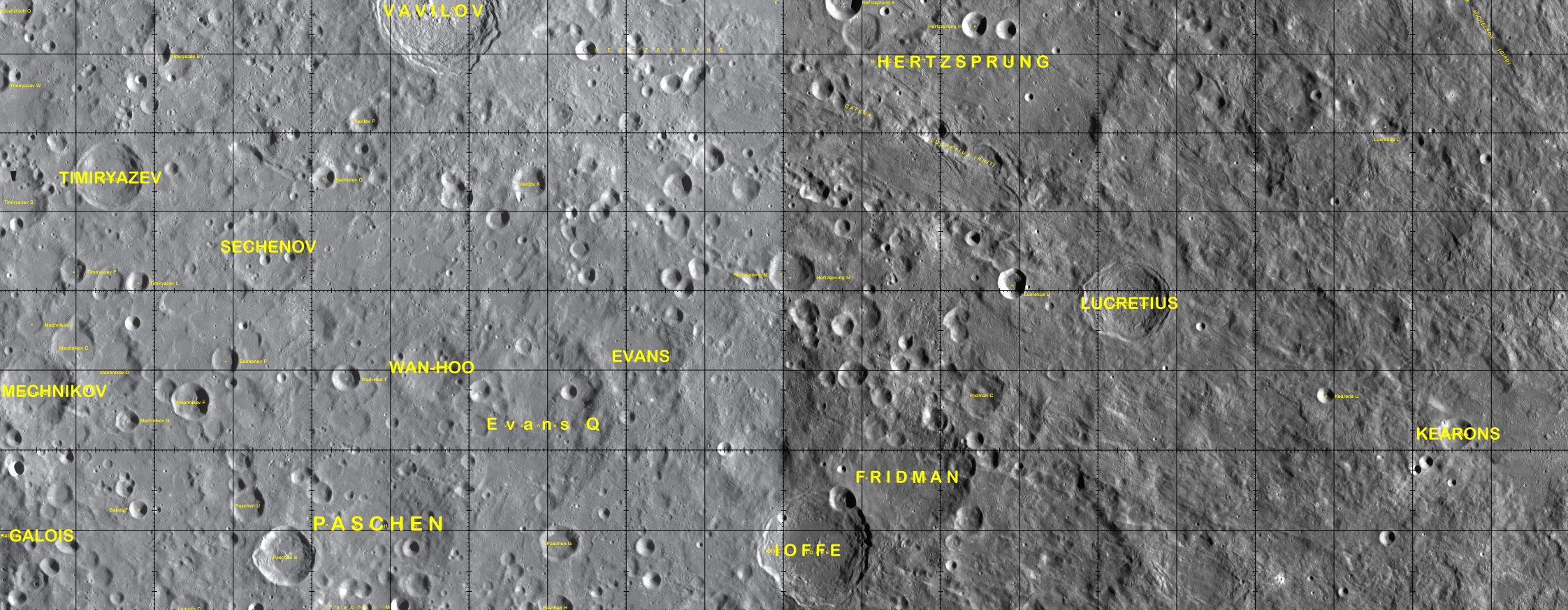 Cráter lunar Evans. Localización. (Imagen LRO)